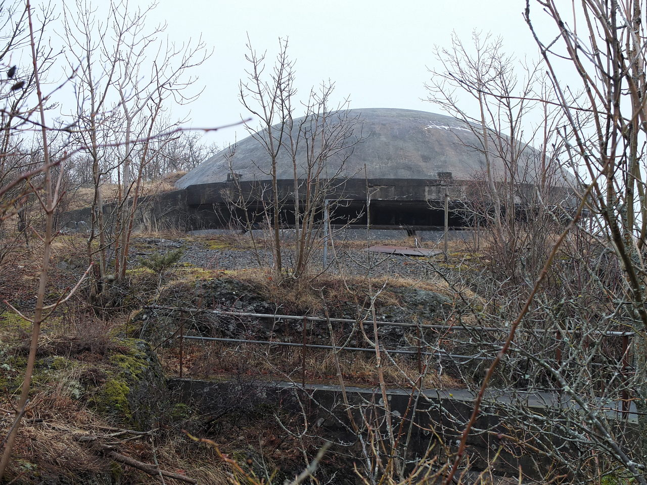 Rauøy fort i Oslofjorden